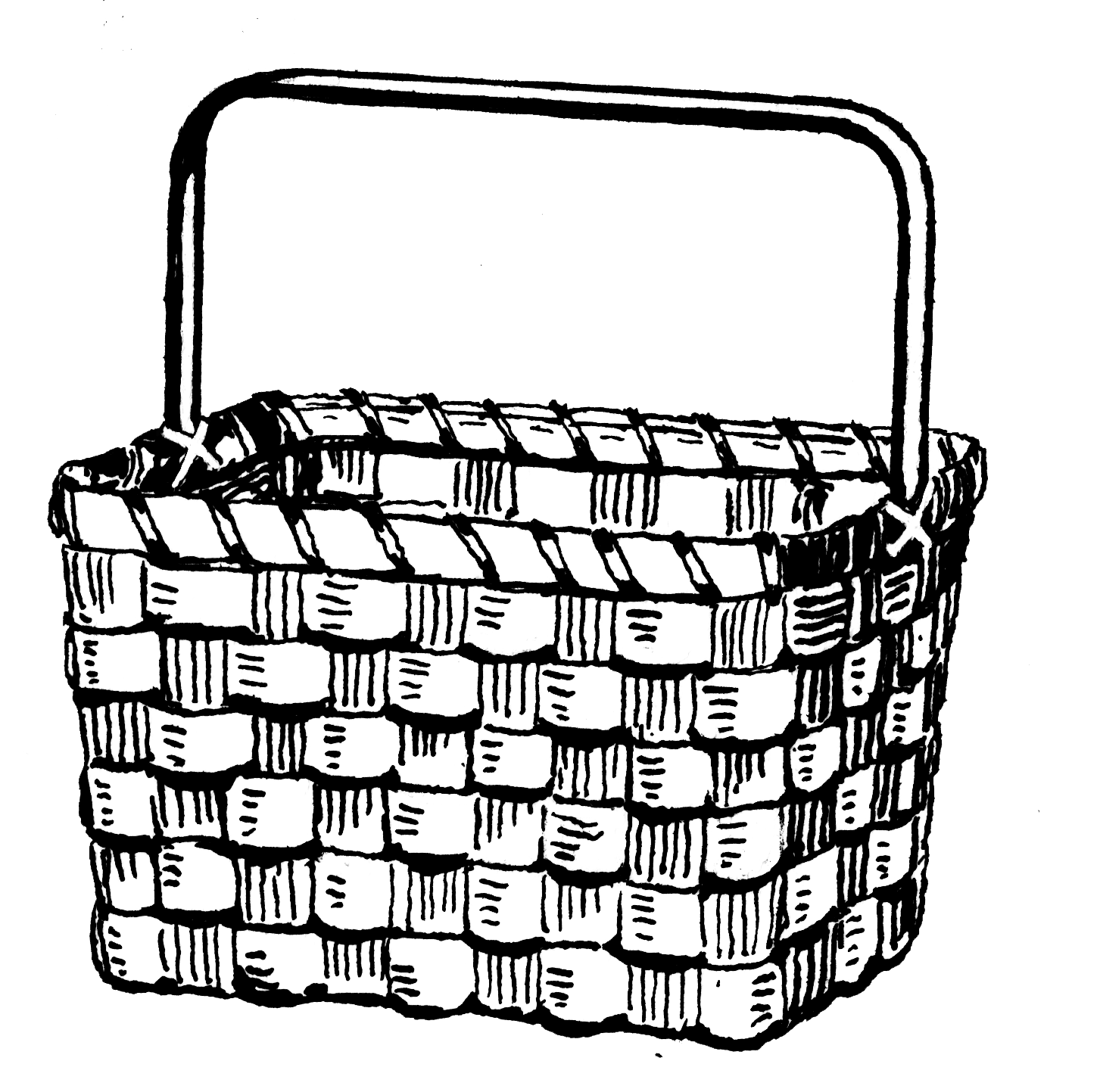 Basket